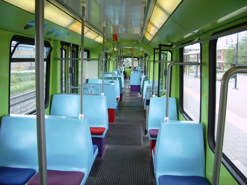 Het interieur van de tram tussen Houten en Houten Castellum.